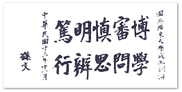 1924年（中華民國13年）11月孫中山先生的國立廣東大學校訓手稿。